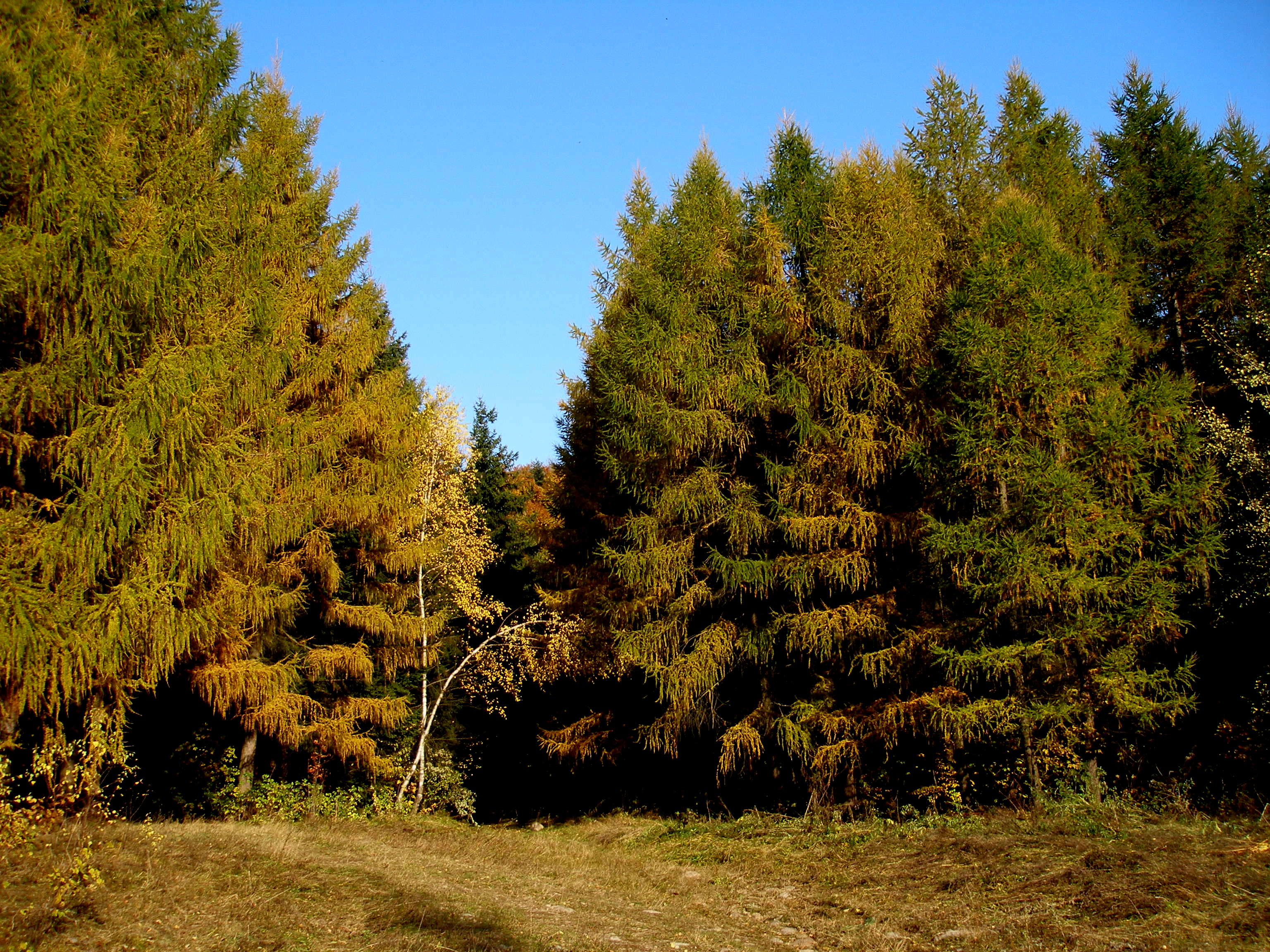 Jeseň v Slanských vrchoch. Obec Zlatá Baňa okres Prešov.